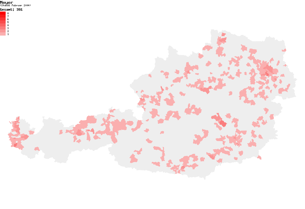 Verteilung des Nachnamens Meyer in Österreich nach dem Telefonbuch mit Stand vom Februar 2004